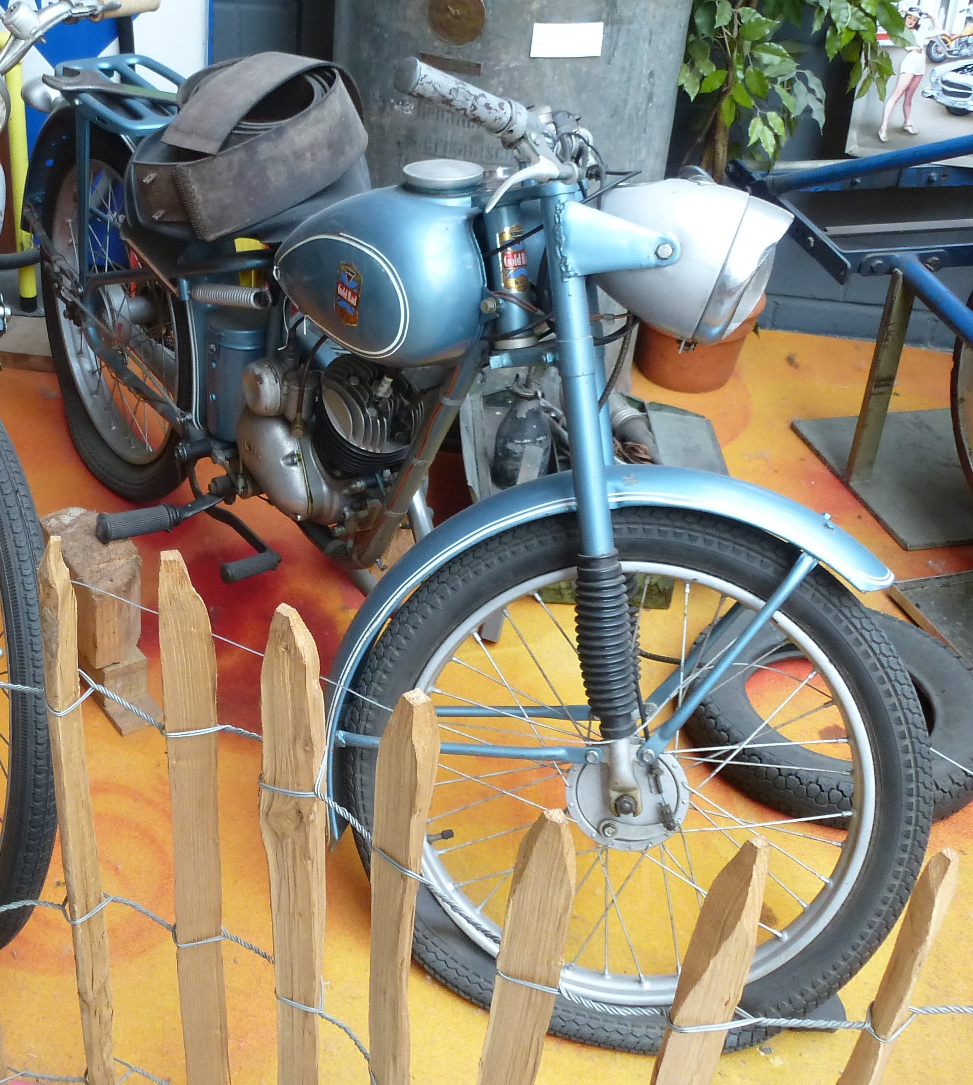 Gold-Rad Motorrad, Modell T 51, frühe 1950er-Jahre. Der Motor ist der Einzylinder-Zweitakt-Einbaumotor von Fichtel & Sachs: 98 cm³, Leistung 2,75 oder 3 PS bei 4000/min, Höchstgeschwindigkeit von 67 km/h; vorn Teleskopgabel, hinten Starrrahmen, serienmäßige Farbe Stahlblau (wie auf dem Foto). Der Preis betrug 850,00 DM.